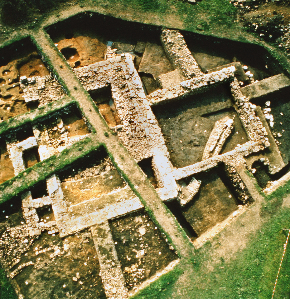 Ausgrabung Herrensitz Düna der Fundamente des Steingebäudes von oben mit Laufstegen zur Profilkontrolle